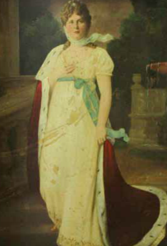 Algeria Benton, esposa de José María reyna Barrios.